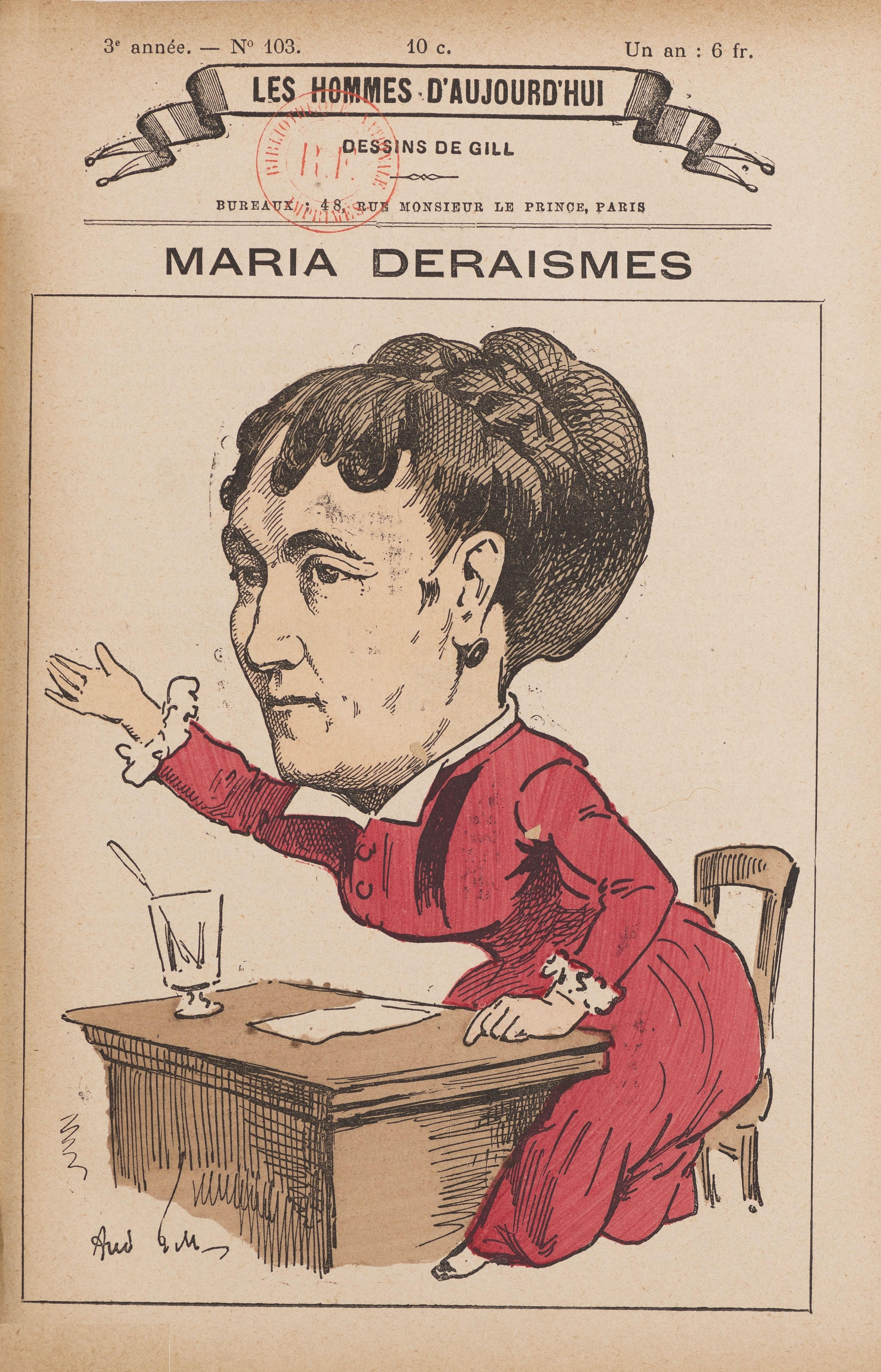 Marie Deraismes (1828-1894), caricature par André Gill,Les Hommes d'aujourd'hui, n°103